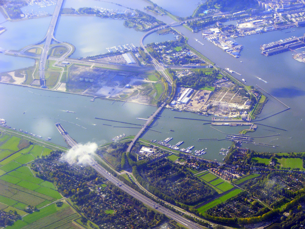 Zeeburgereiland, luchtfoto vanuit het noorden. Met linksboven de aansluiting S114 op de ring A10, links midden de Zeeburgertunnel, rechtsonder de Oranjesluizen.